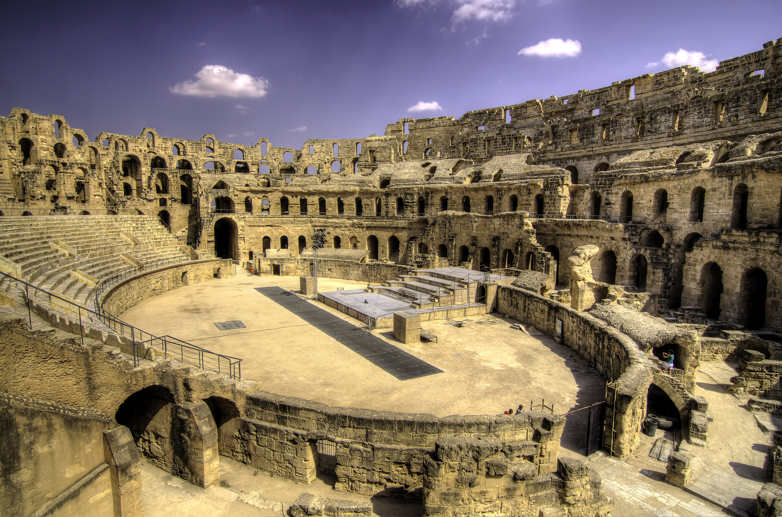 Amphithéâtre, d'El Jem